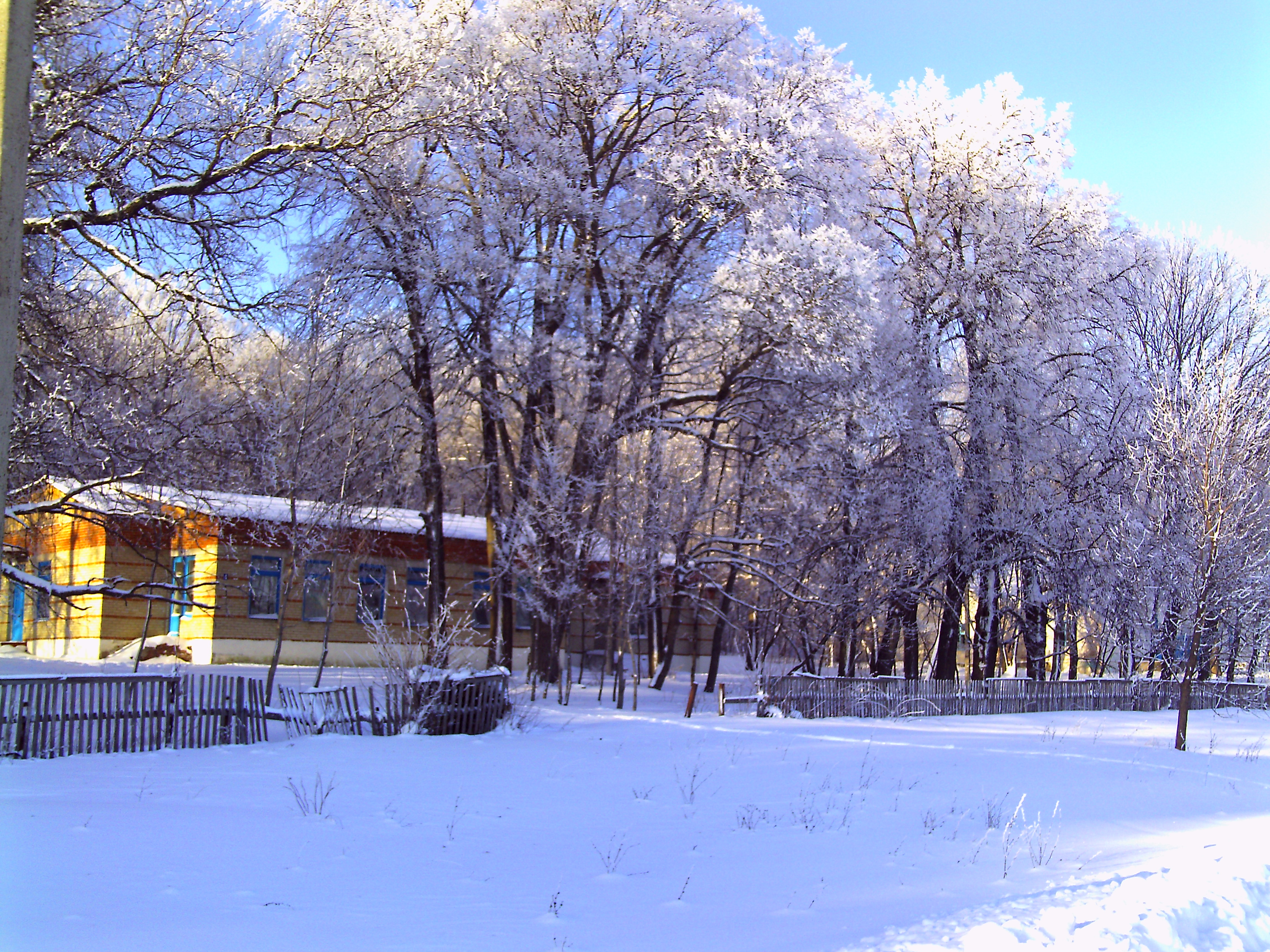 Зима в селе Гагарино